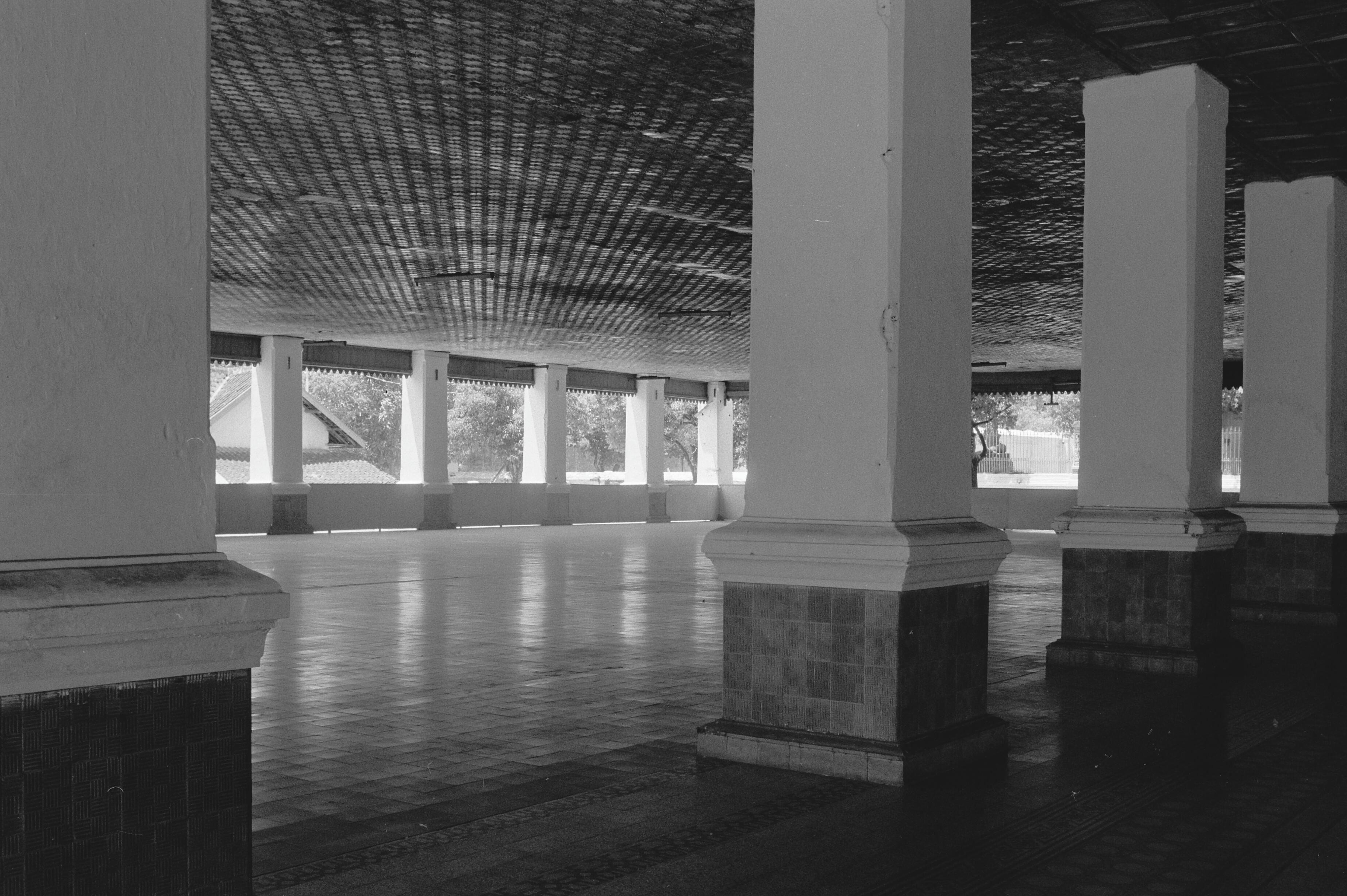 Interieur ontvangsthal, Kraton, Pagelaran Onderwerp: paviljoenen, ontvangsthallen, hallen